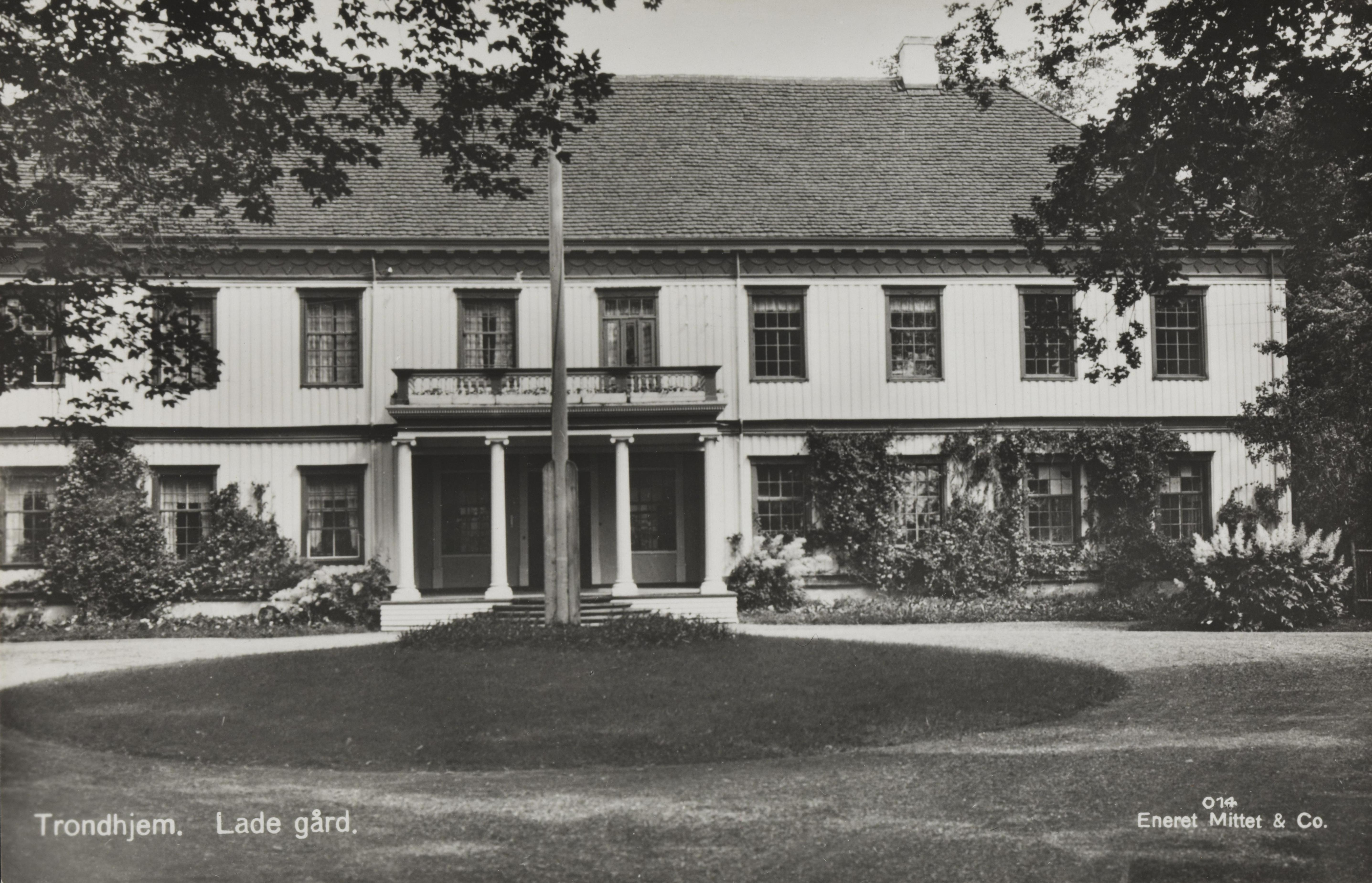 Bildet er hentet fra Nasjonalbibliotekets bildesamling Lade,Lade Gård, Trondheim, Sør Trøndelag